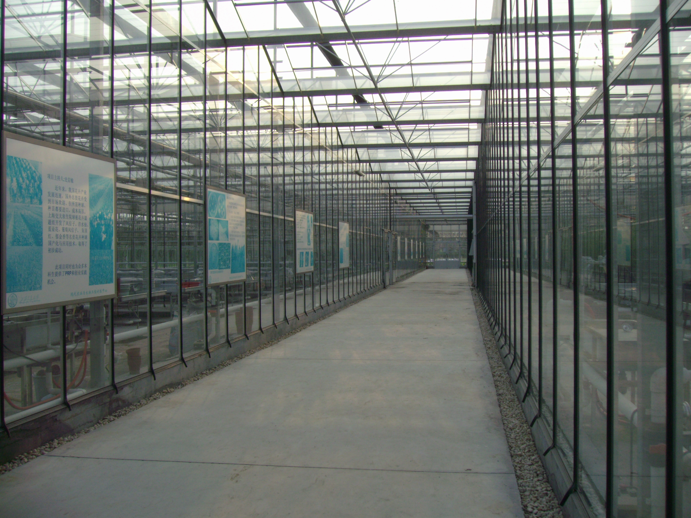 上海交通大学农业与生物学院温室内景